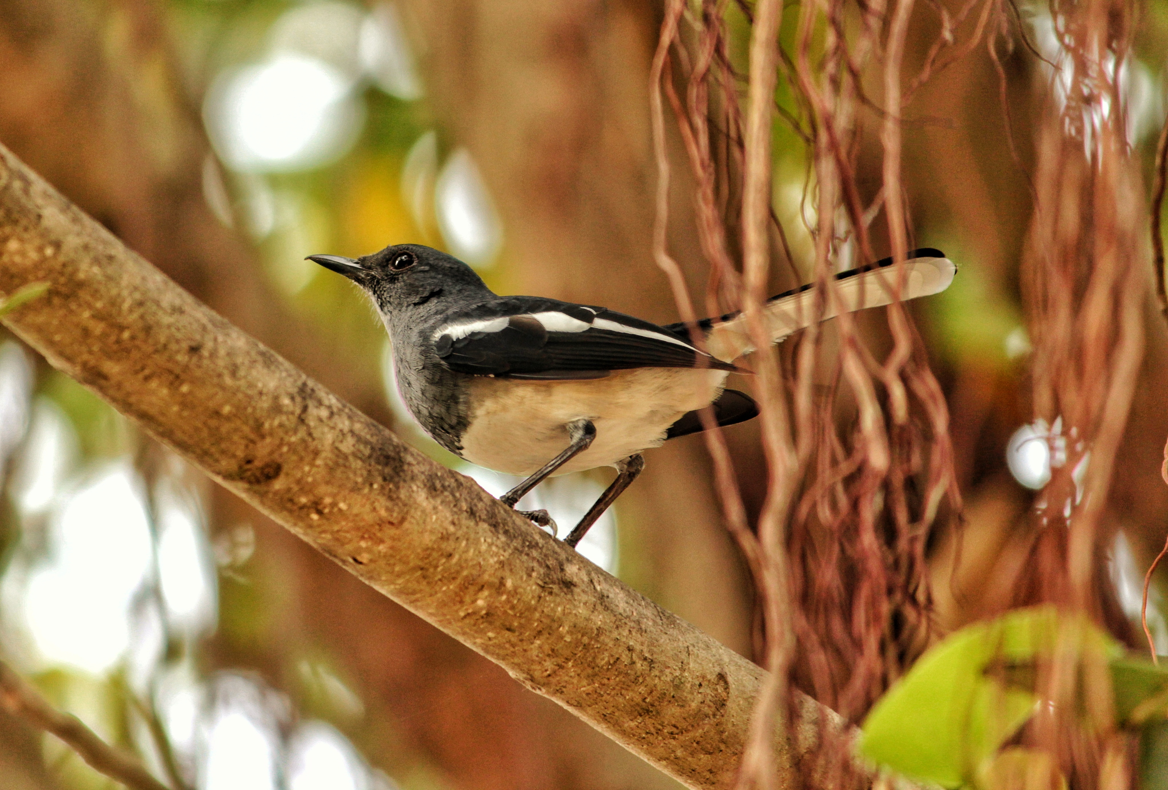 Robin